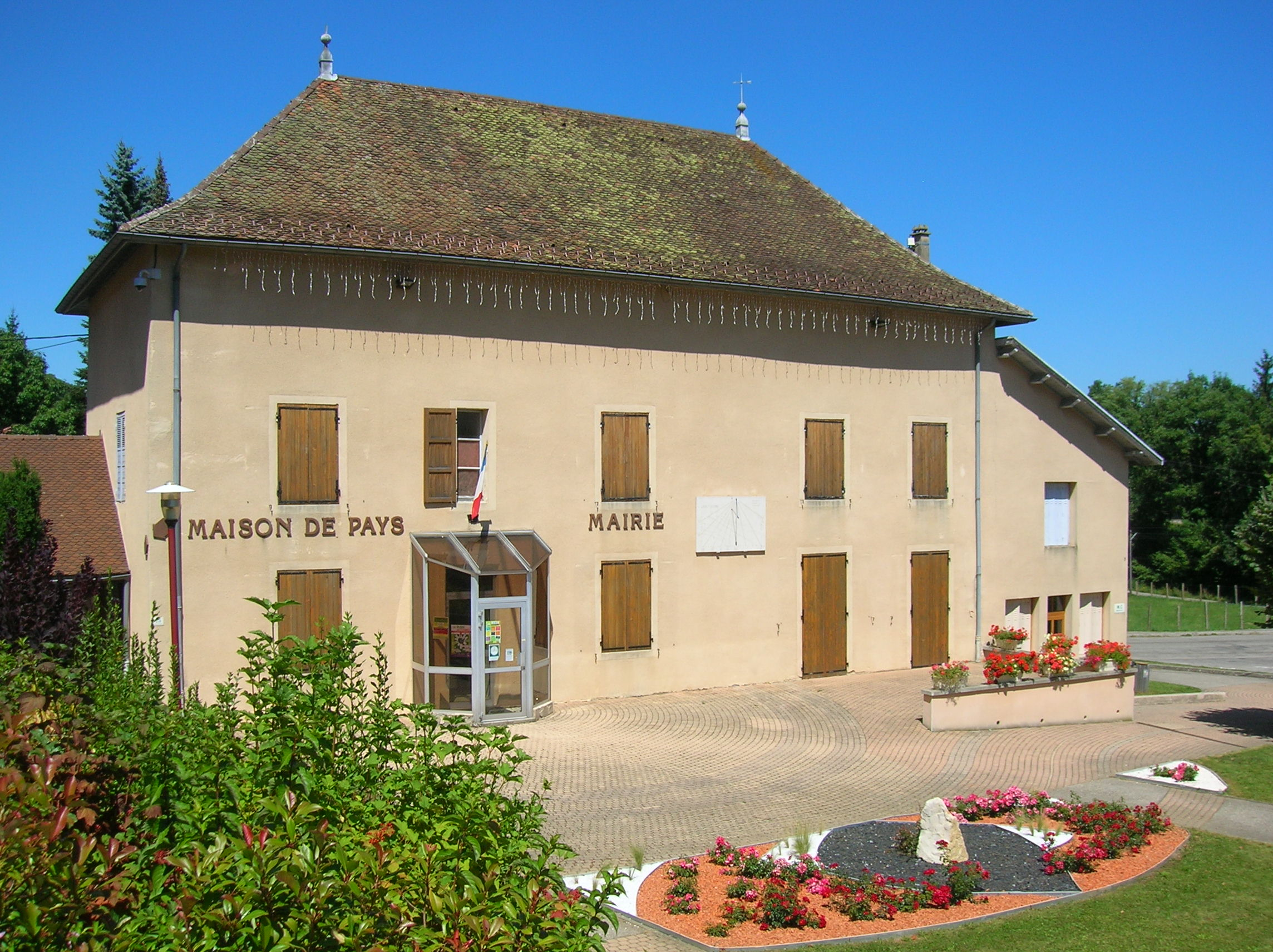 mairie et ancien musée de Charavines, Isère, AuRA, France.